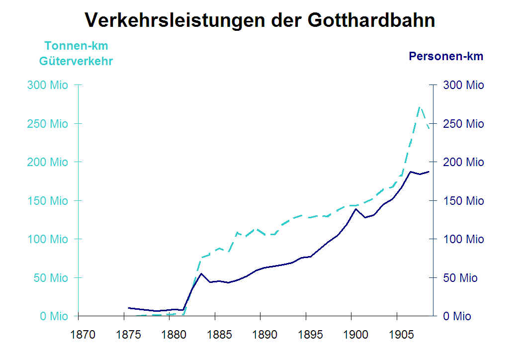 Entwicklung der Transportmengen der Gotthardbahn-Gesellschaft Tonnenkilometer sind die Summe der zurückgelegten Wegstrecken von sämtlichen Gütertonnagen inklusive Gepäck und Tiere (Total Güter in Tonnen multipliziert mit der durchschnittlichen Transportdistanz in Kilometern). Personenkilometer sind die Summe der zurückgelegten Wegstrecken sämtlicher Passagiere (Total der Reisenden multipliziert mit der durchschnittlichen Reisedistanz). Tonnen- und Personenkilometer sind gebräuchliche Masse, um die erbrachten Leistungen einer Bahn einzuschätzen.